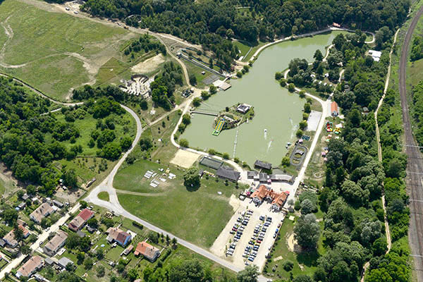 Légi fotó a Sobri Jóska Bakonyi Kalandparkról, Kislőd